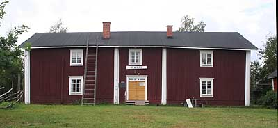 Nurmon museon tuparati